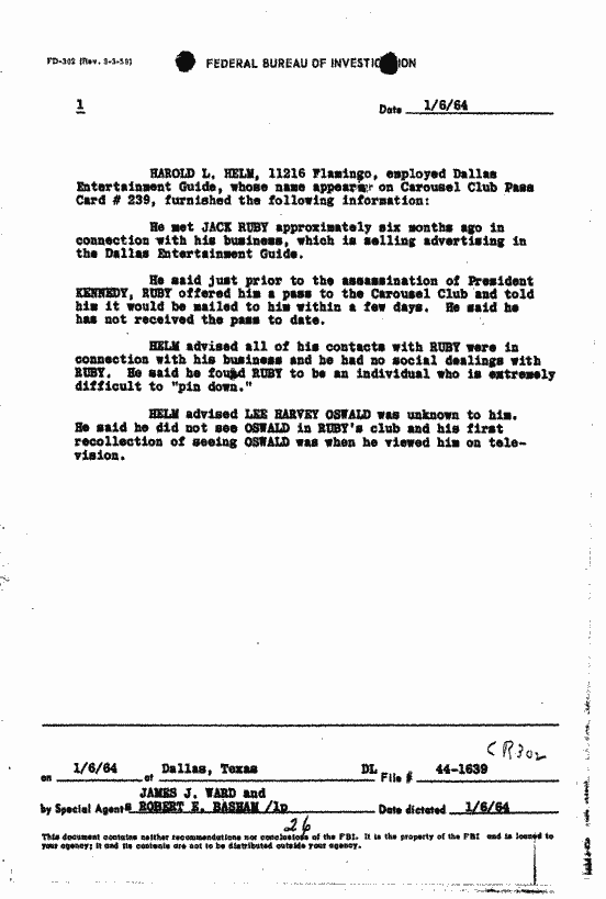 An FBI-302 detailing an interview